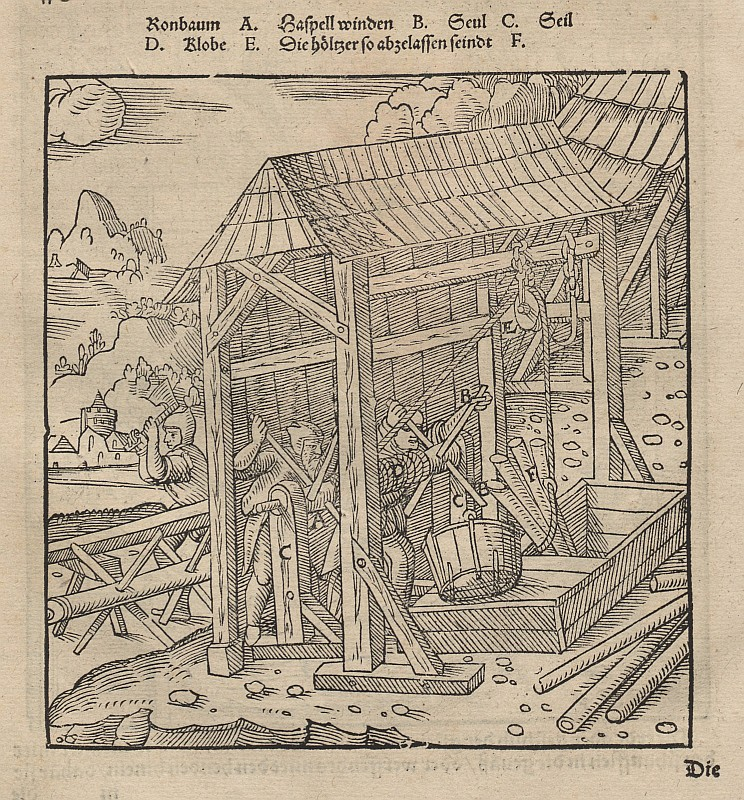 Original image description from the Deutsche Fotothek Bergwerk & Bergbau & Haspel